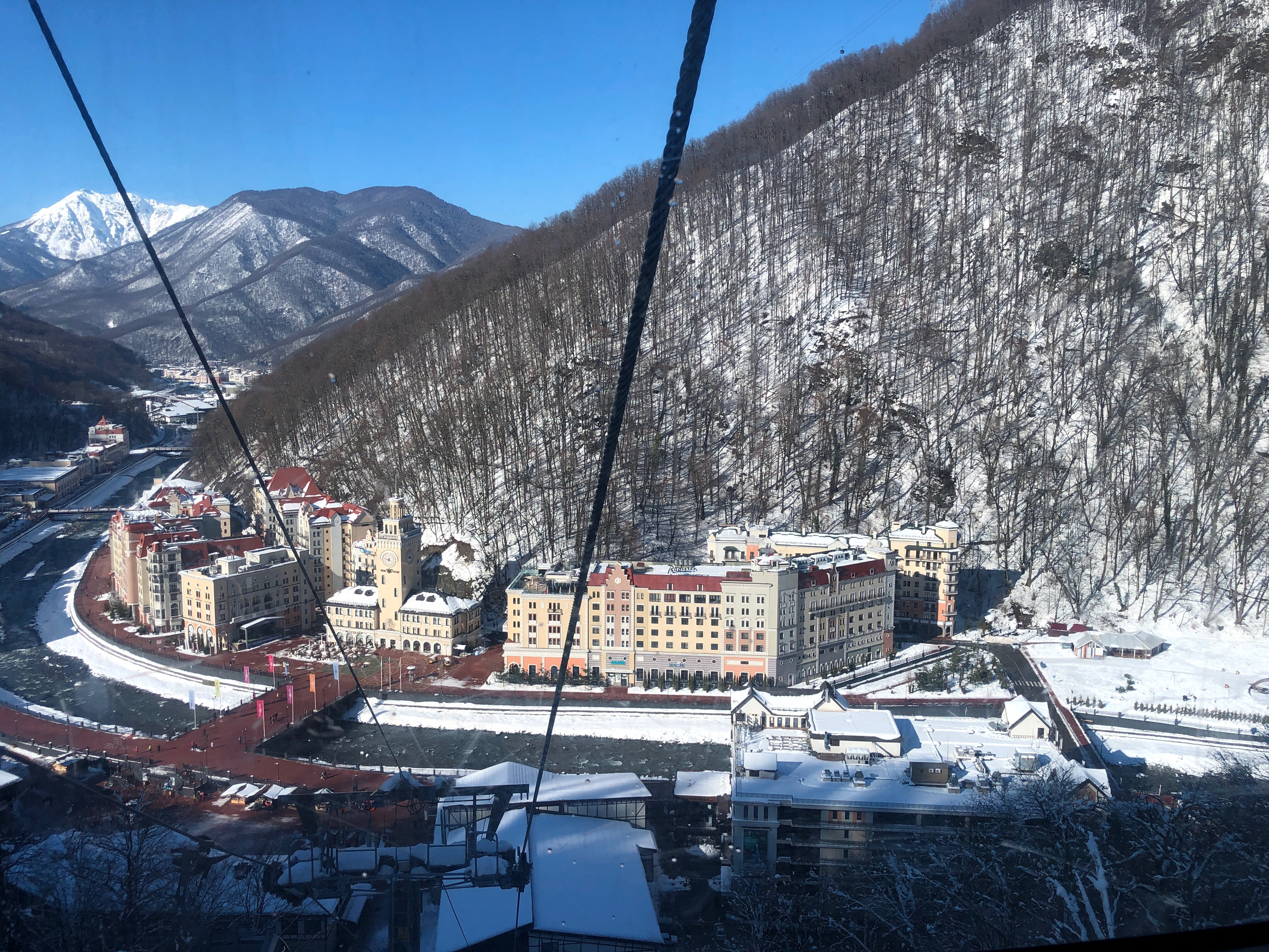 Красная поляна